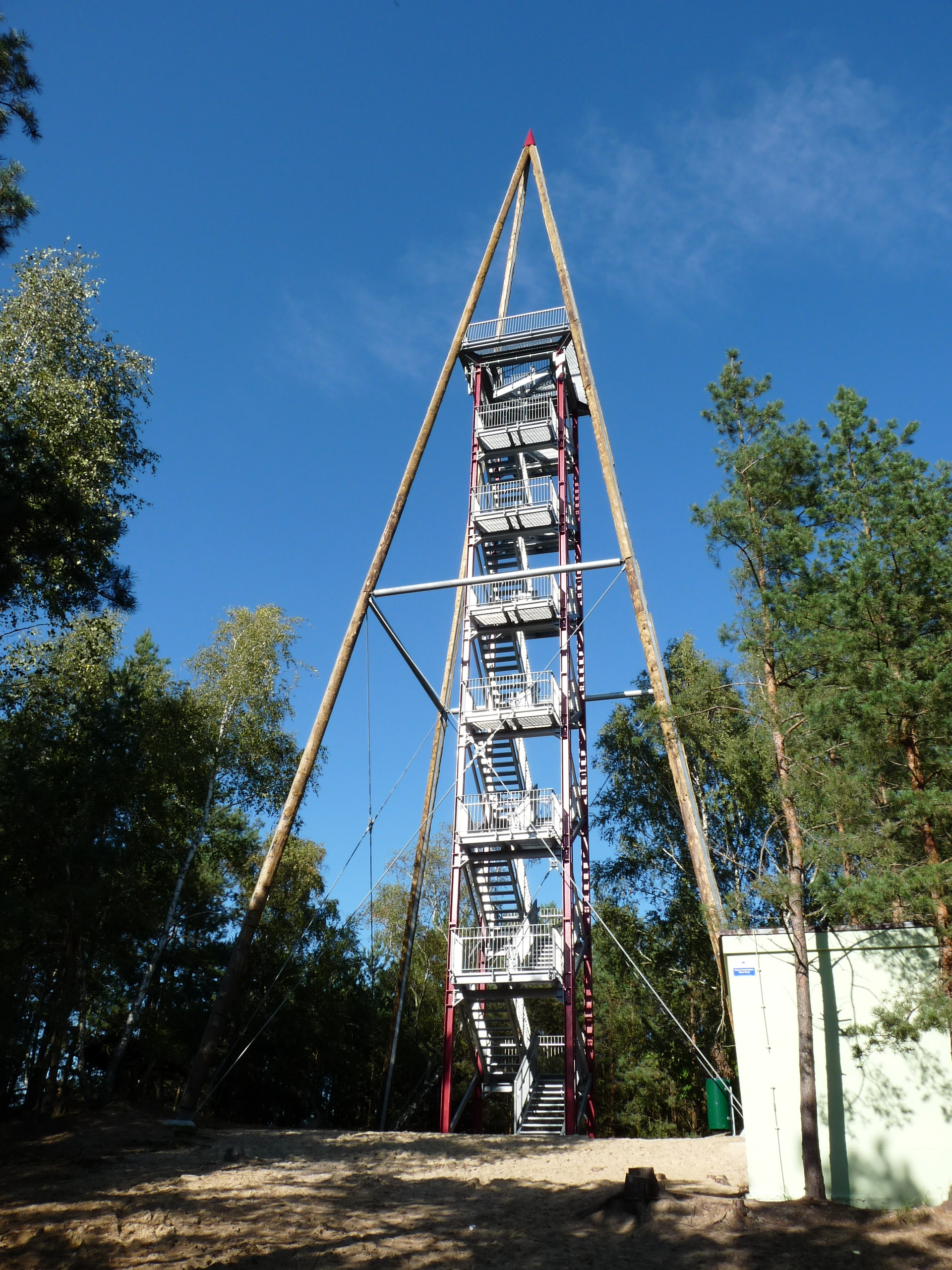 Aussichtsturm auf dem Götzer Berg, der am 14. Juni 2012 eröffnet wurde. Grundsteinlegung war am 12. Oktober 2011. Der aus verzinktem Stahl gefertigte Aussichtsturm hat eine Höhe von 42 Meter.